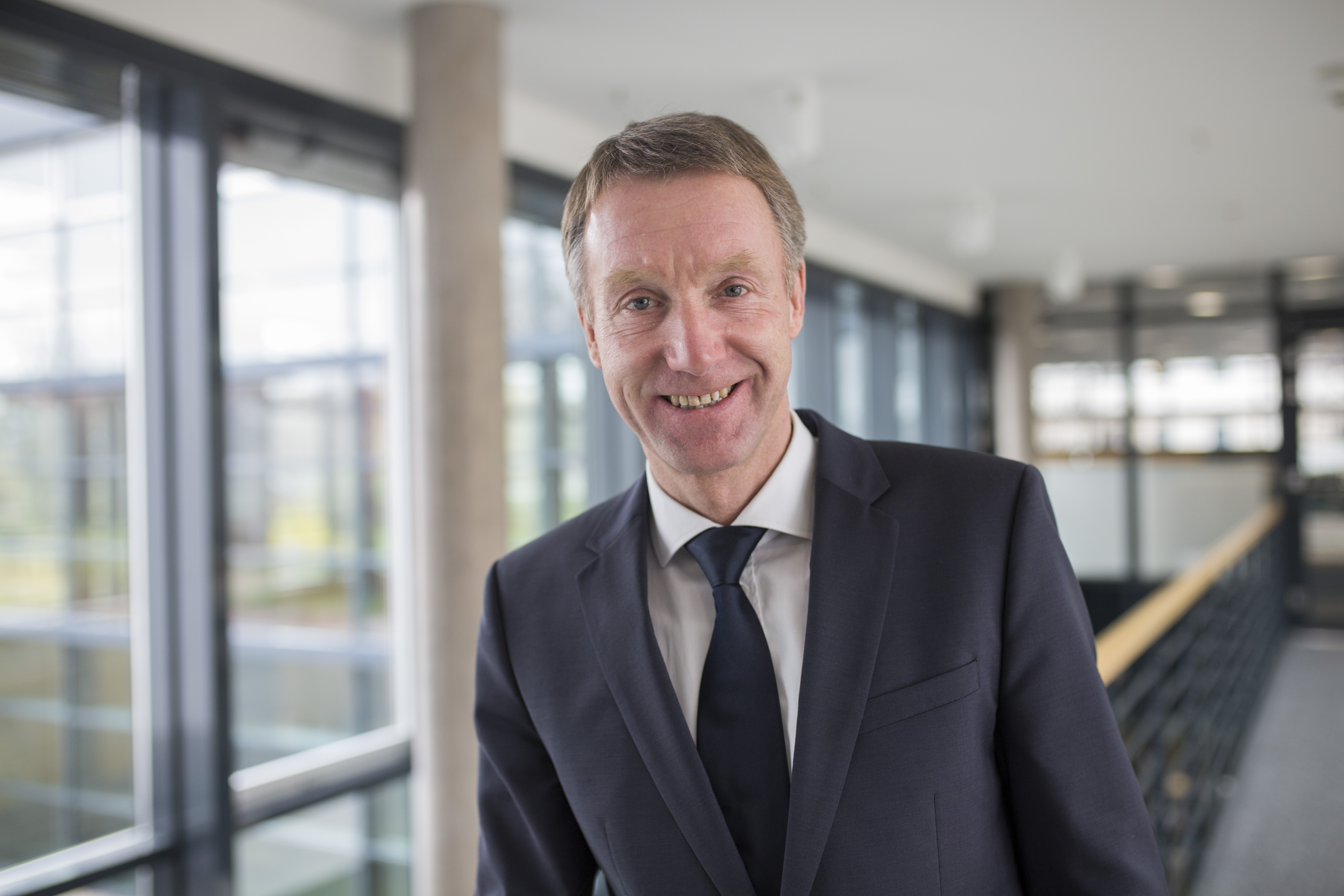 Raymond Walk, Landtagsabgeordneter Thüringen (CDU)